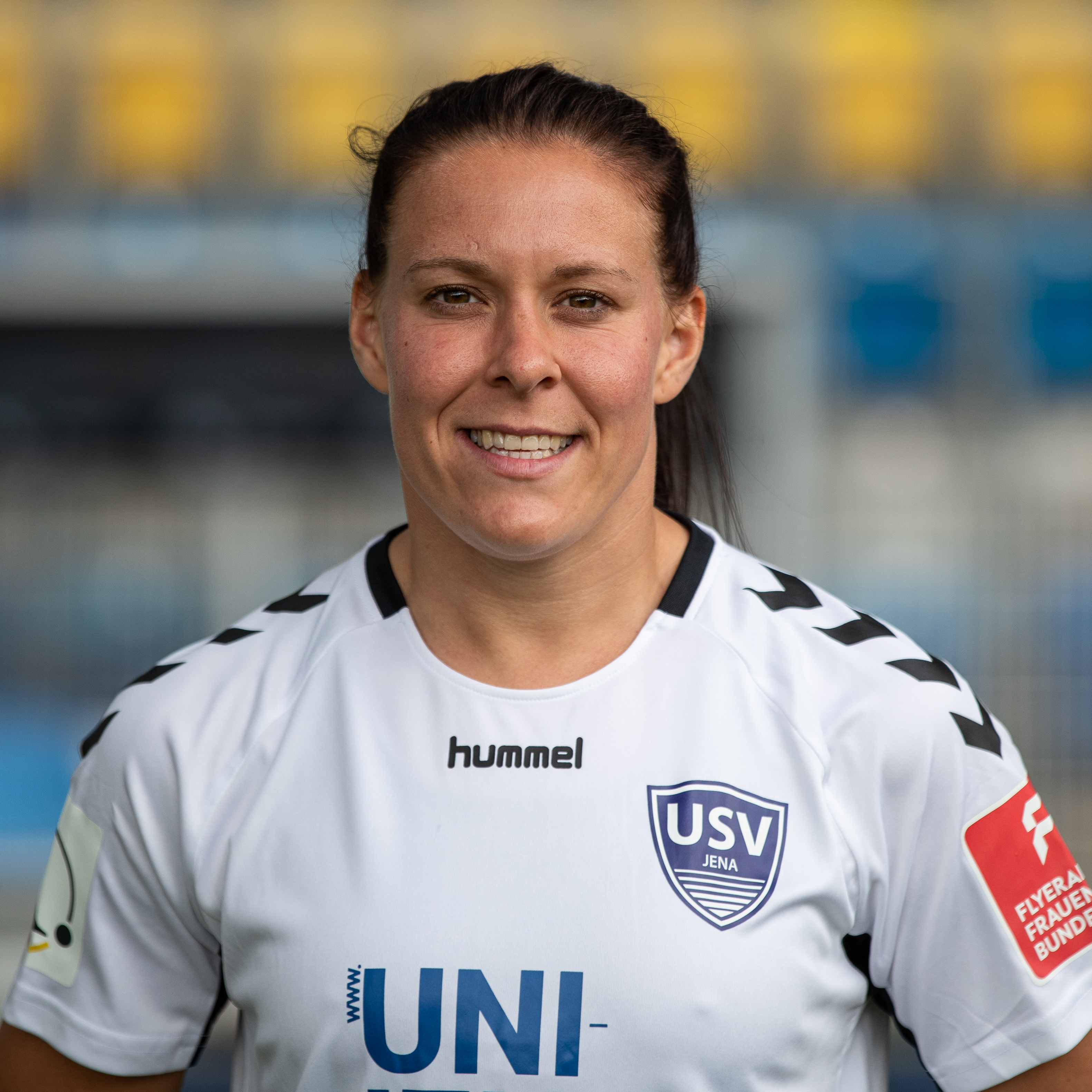 Fußball, Flyeralarm Frauen-Bundesliga, Mannschaftsfotos FF USV Jena; Lisa Seiler (FF USV Jena, 17); Porträt, Einzelbild